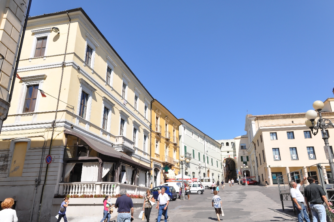 Penne (comune, Italy) 2012